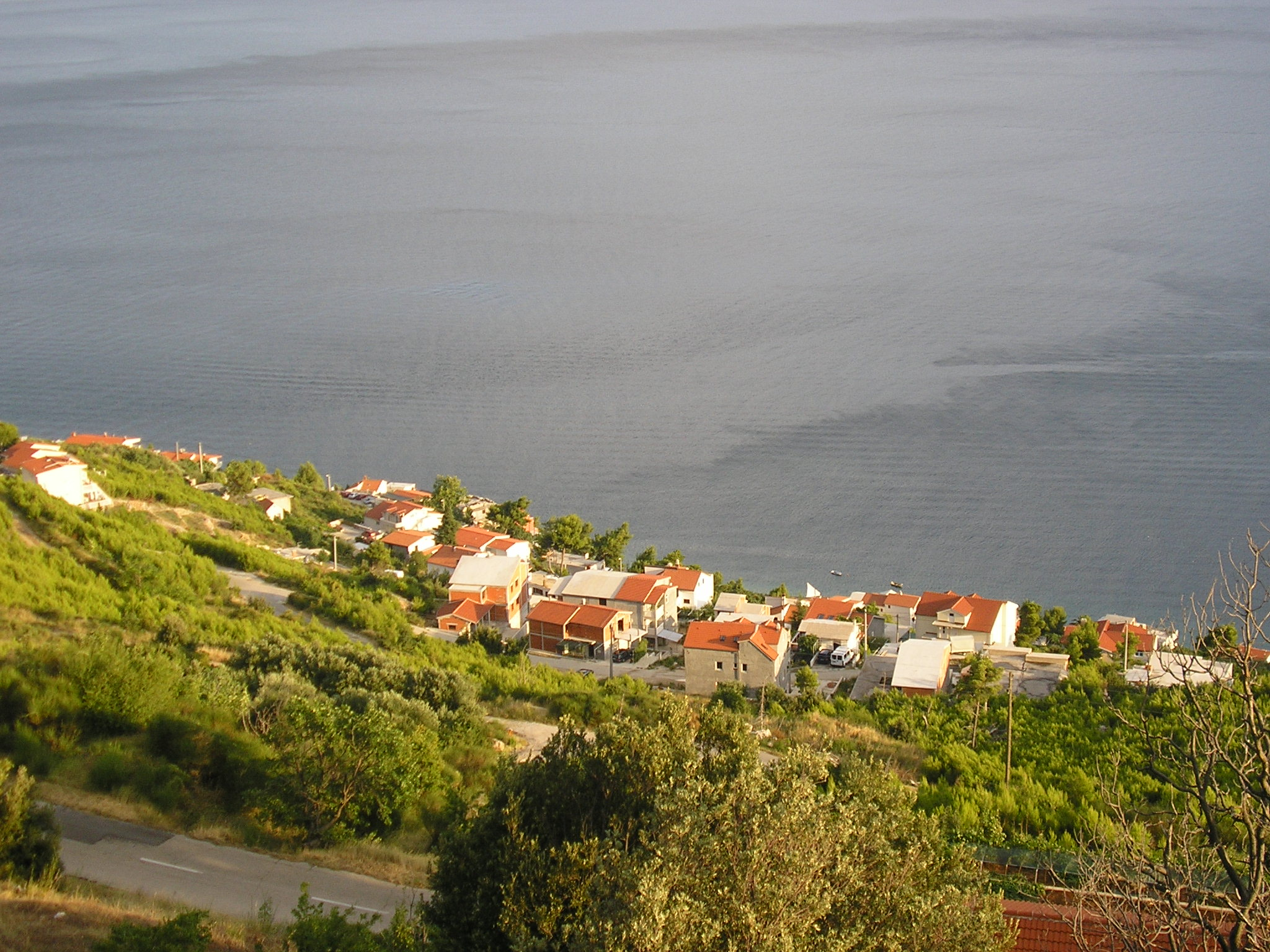 Staro selo Čelina